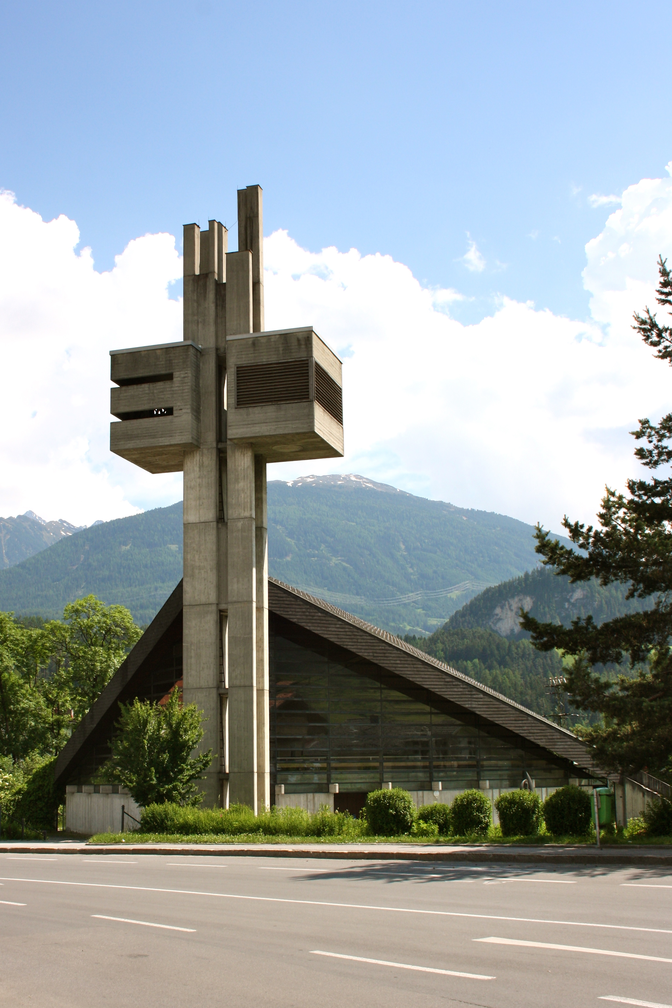 Kirche zu den Heiligen Engeln in Brennbichl, Stadtgemeinde Imst.